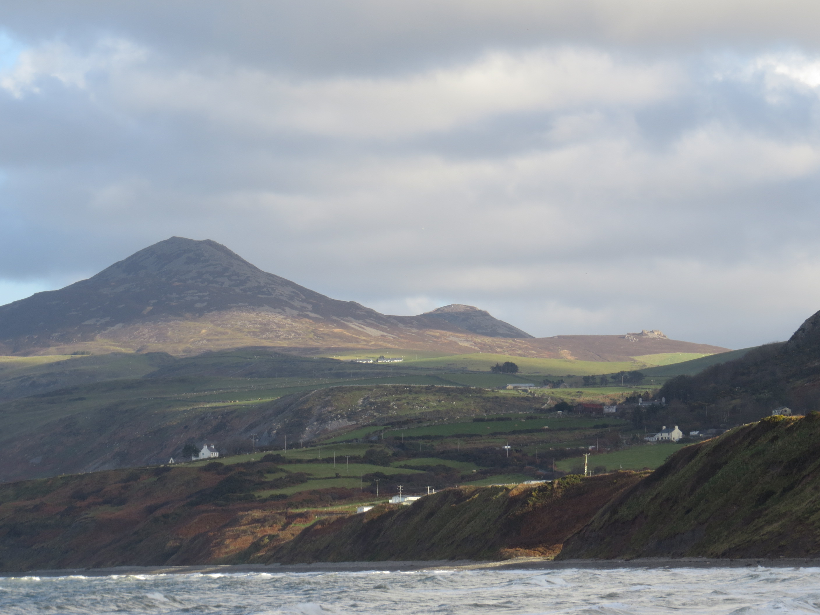 Golygfa o'r traeth, Nefyn